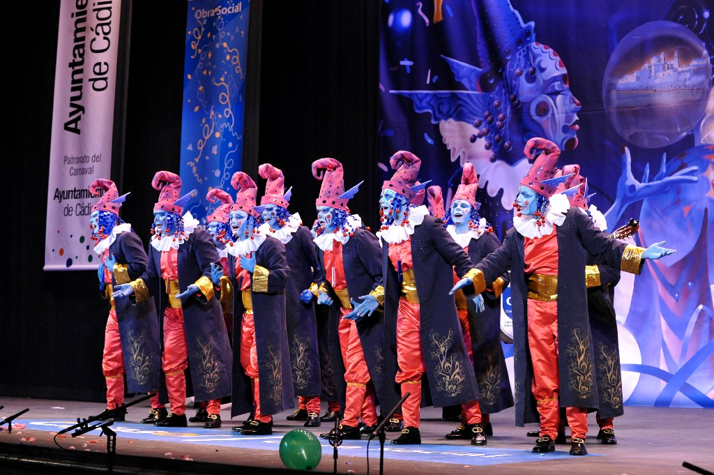 Actuación de la comparsa "El sueño de febrero" en Gran Teatro Falla de Cádiz, en la fase preliminar del COAC